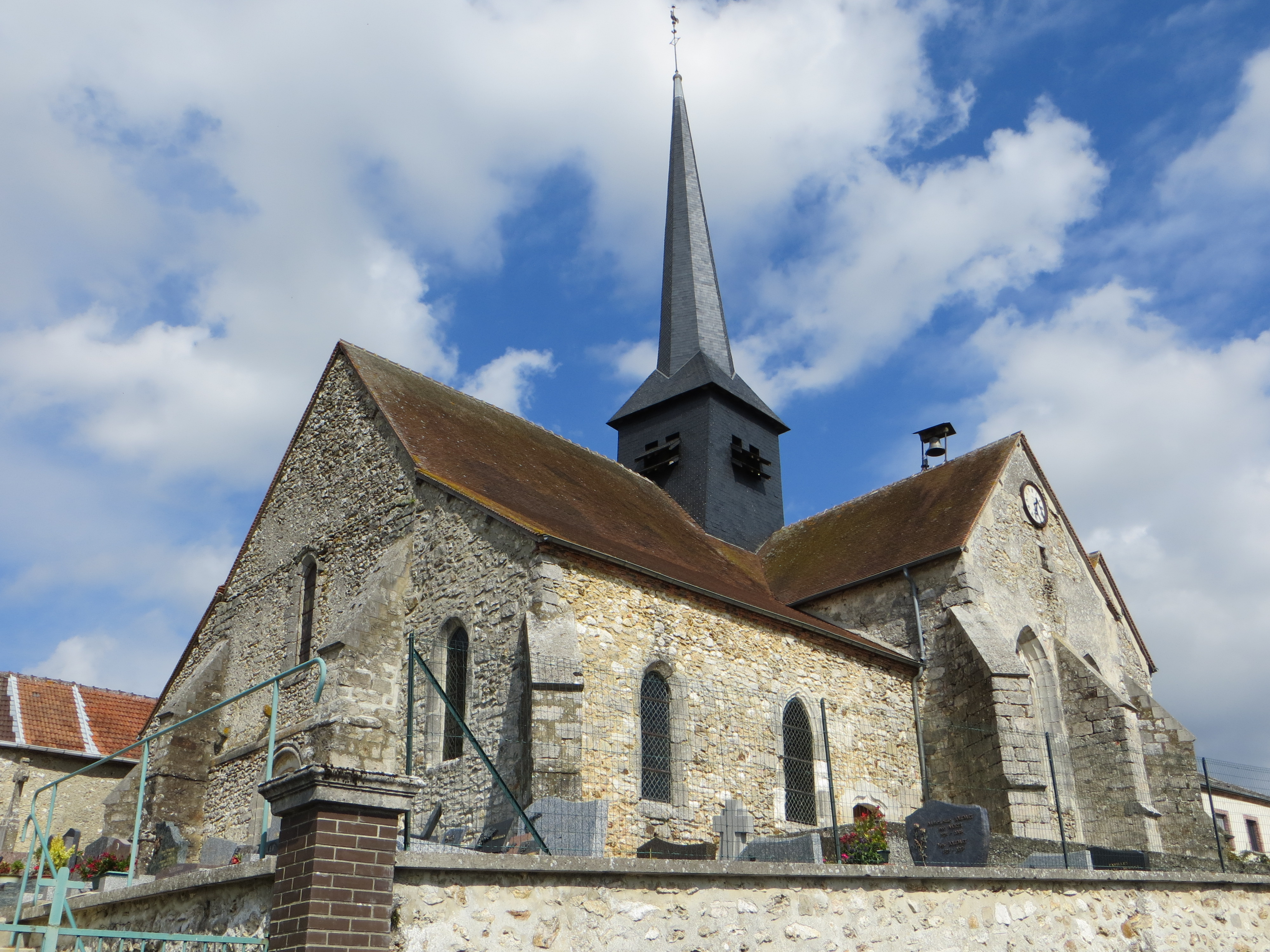 Vue générale de l'église